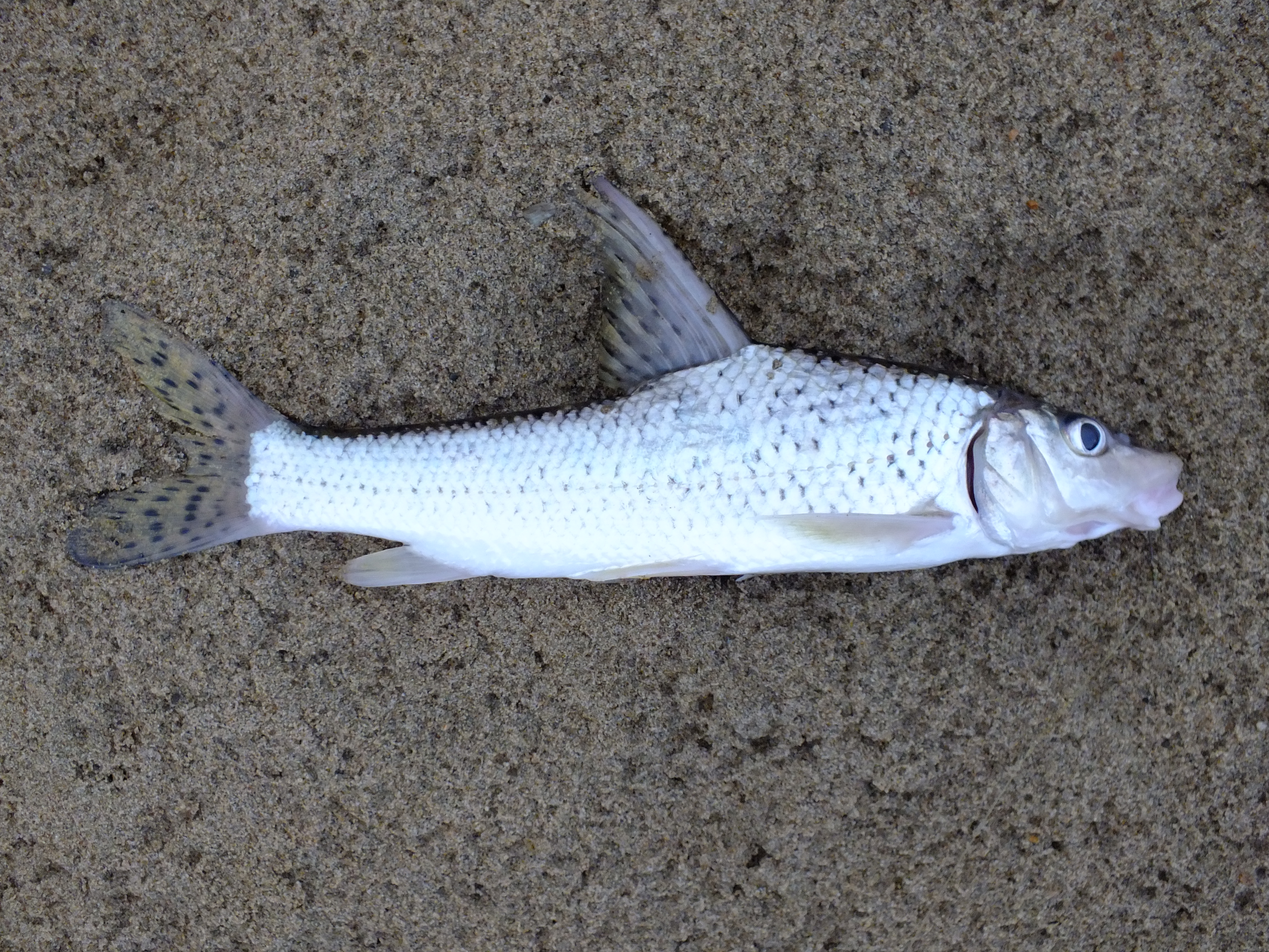 Рыба Конёк, поймана в Амуре